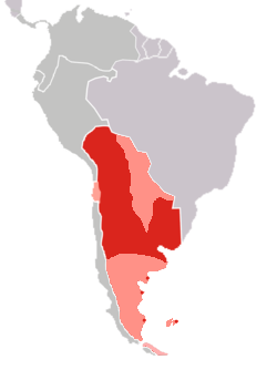 mapa del rio de la plata, en color mas claro zonas sin control efectivo. trabajo propio, modificando el Mapa_Virreinato_Rio_de_la_Plata.png pruxo 2007